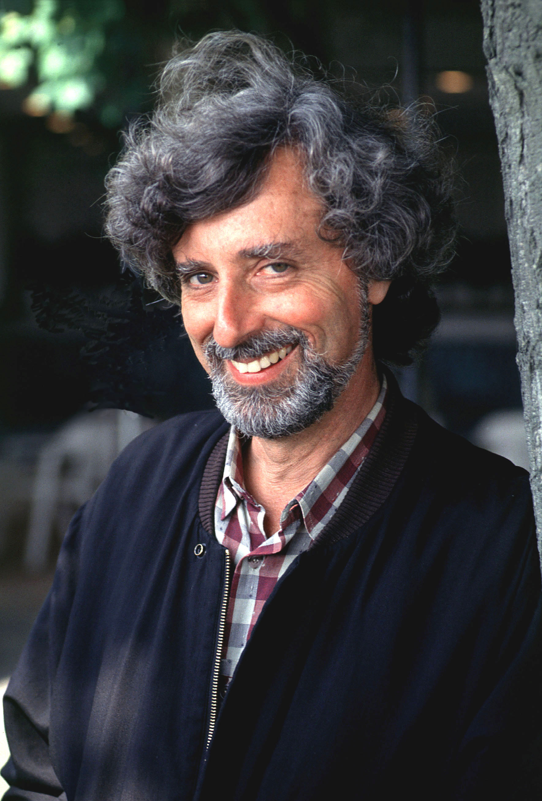 Il regista statunitense Philip Kaufman alla Mostra del Cinema di Venezia del 1991